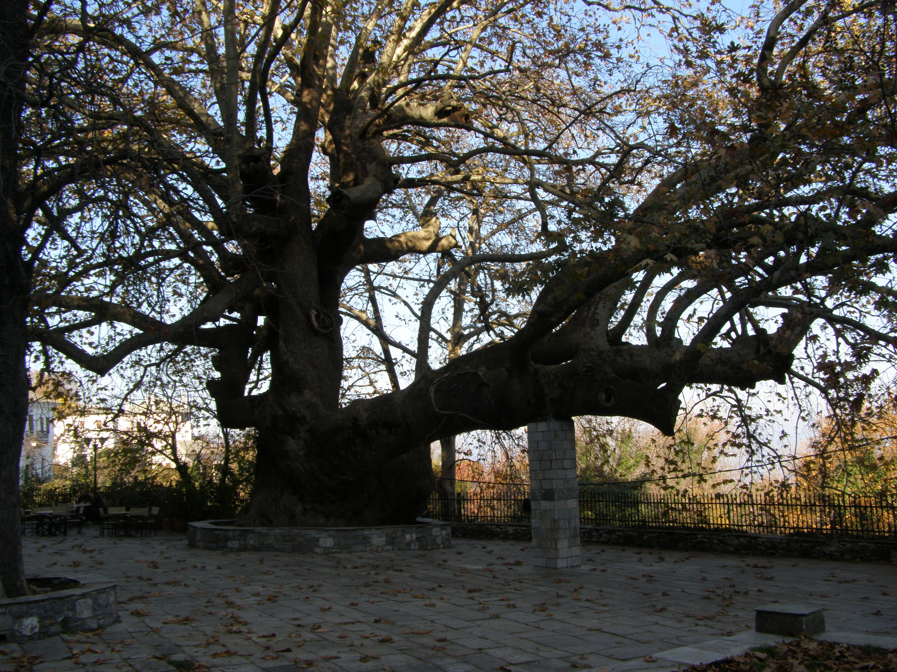 Πλάτανος στην Τσαγκαράδα